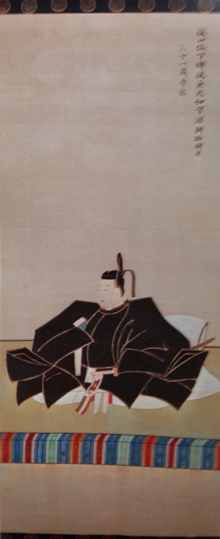 松平朝矩の肖像。